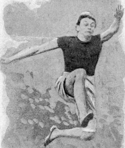 Alvin Kraenzlein vainqueur du saut en longueur aux JO 1900.